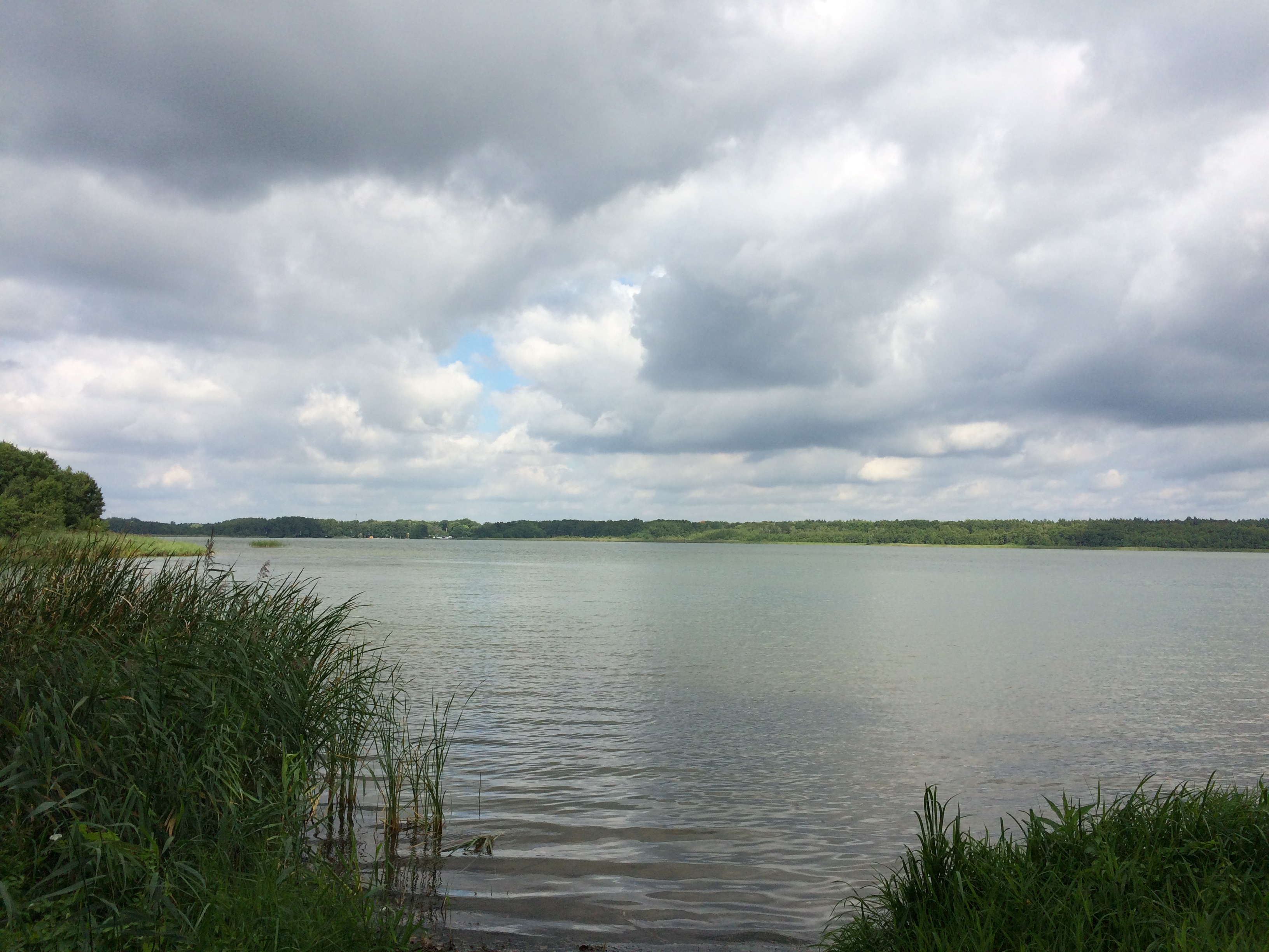 Pätzer Vordersee in Pätz, ein Ortsteil der amtsfreien Gemeinde Bestensee im Landkreis Dahme-Spreewald in Brandenburg.